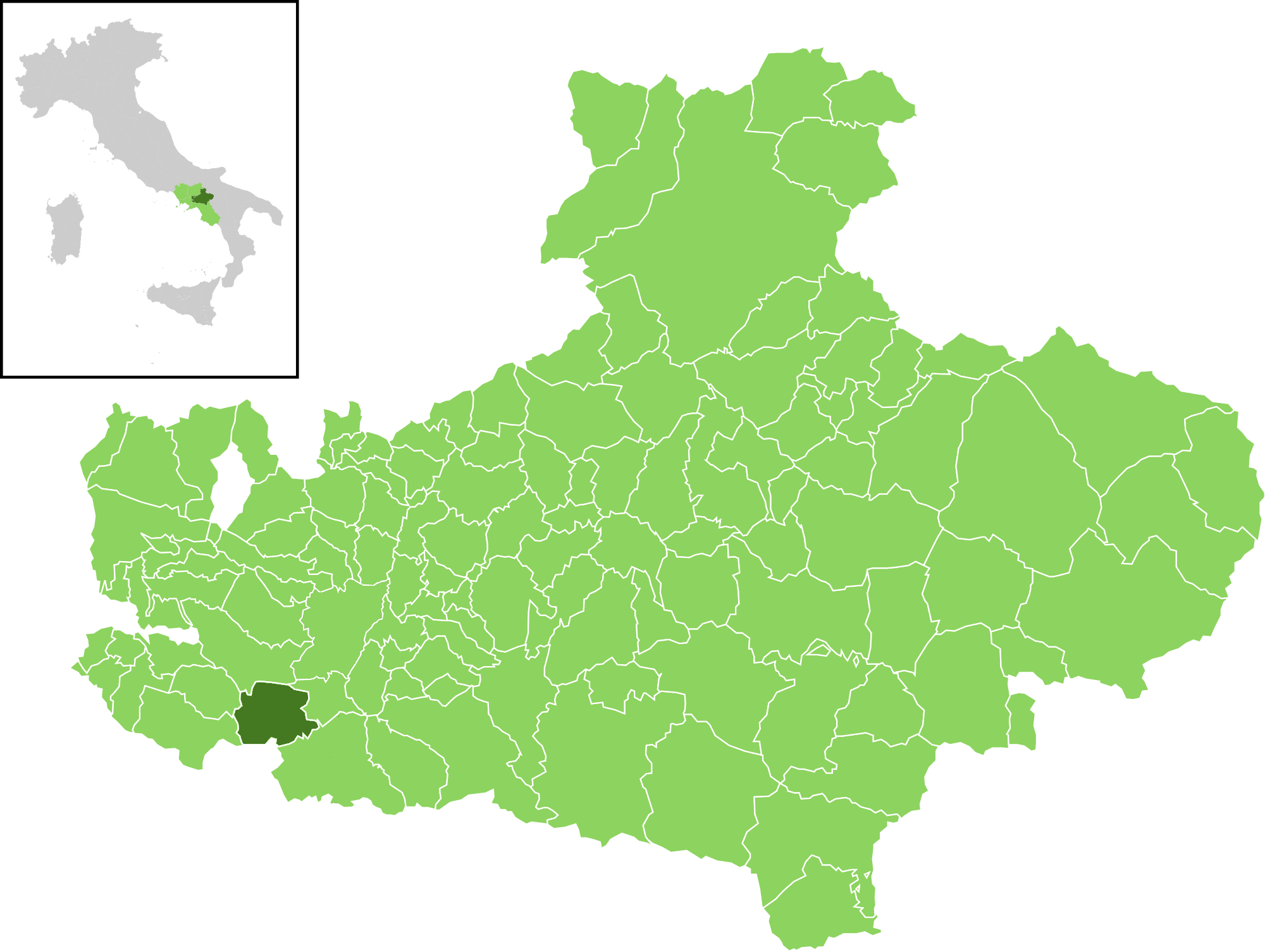 Il comune all'interno della provincia di Avellino